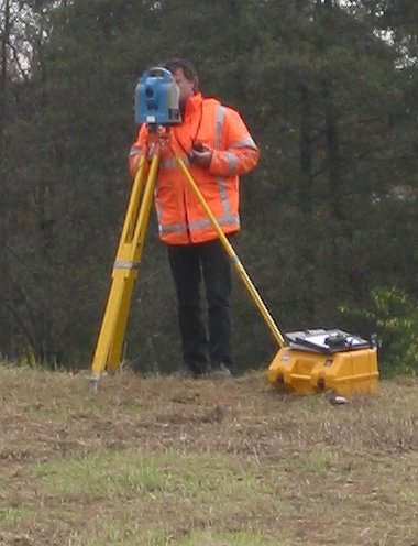 Tachymeter